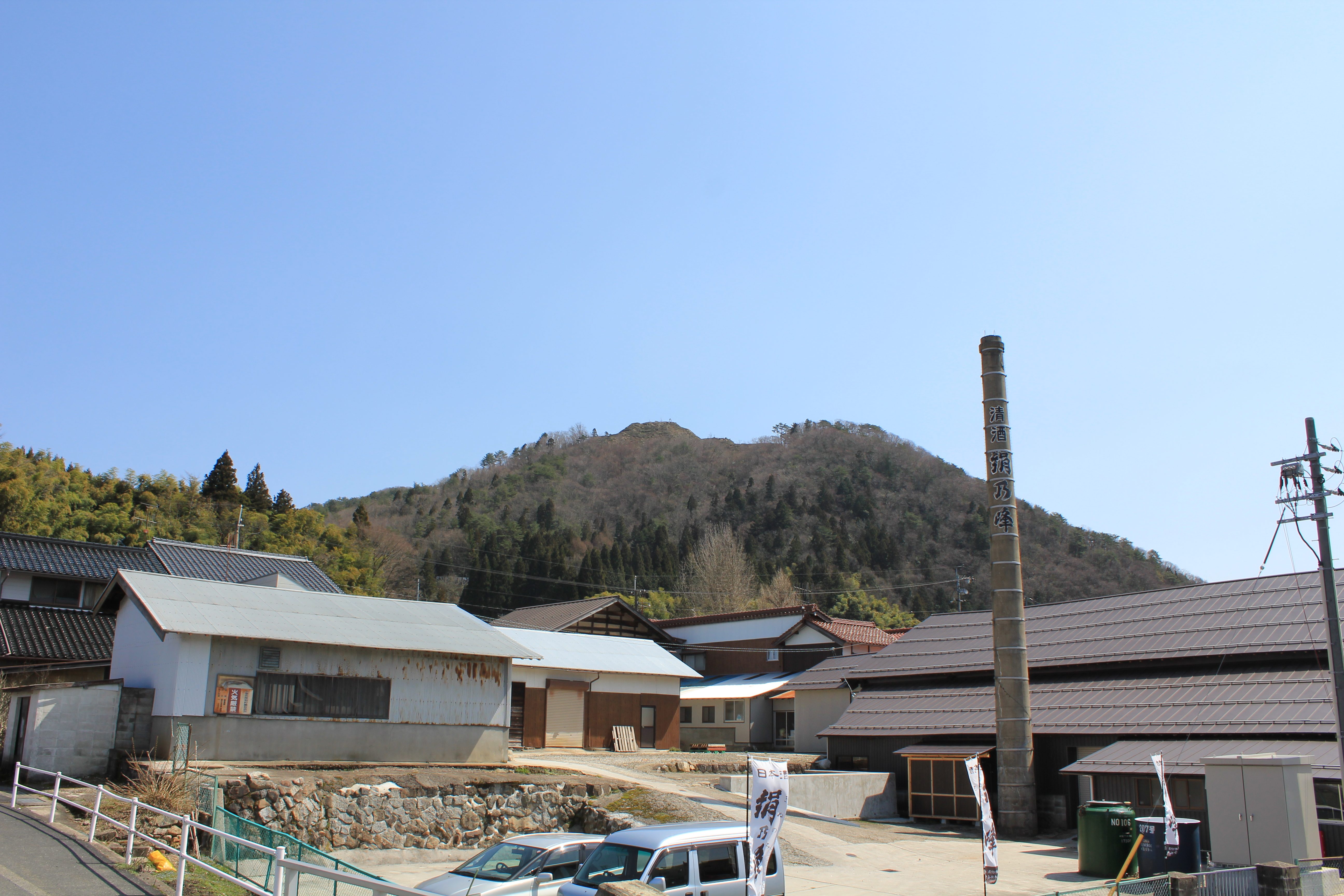 島根県、赤穴瀬戸山城遠景